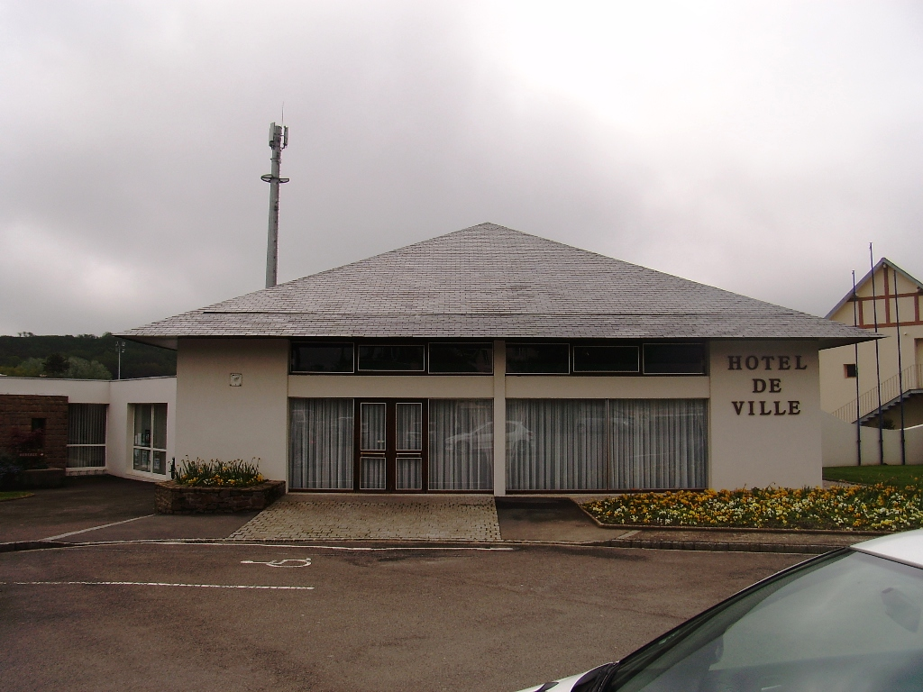 Hôtel de Ville de Jullouville (50)